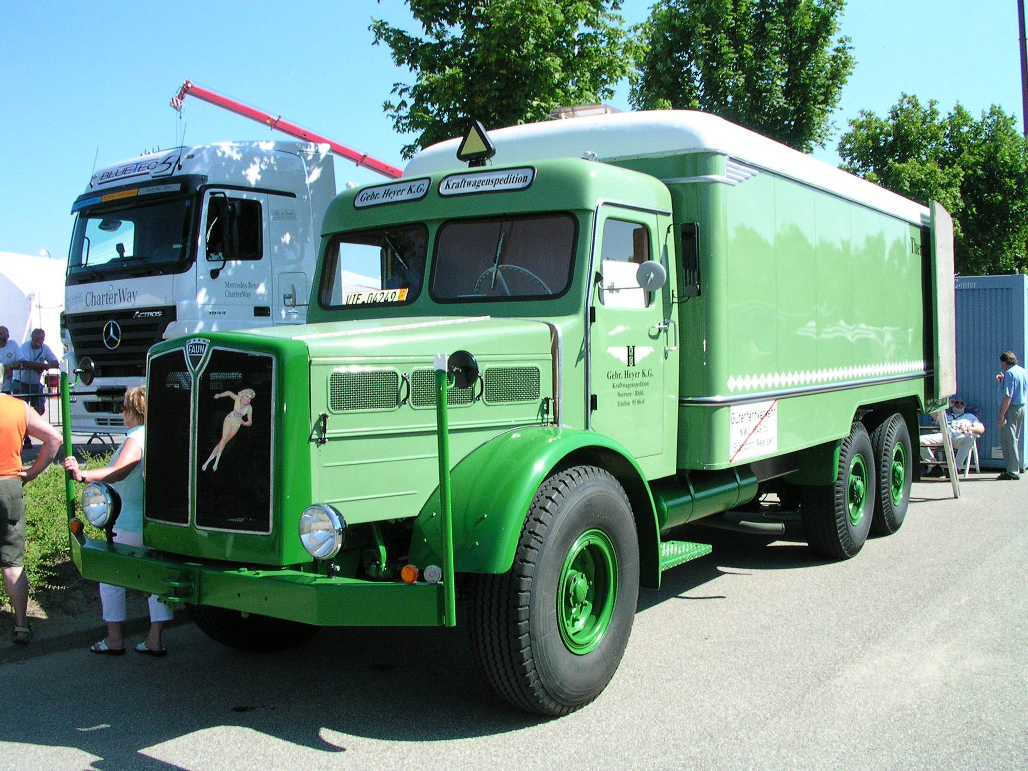 Wörth am Rhein, Oldtimer-Treffen bei Daimler-Chrysler Faun F 603 Koffer-LKW, 6 Zylinder-Dieselmotor, ca. 100 Kw (130 PS), 8 l Hubraum, Luftkühlung, vMax 75 km/h